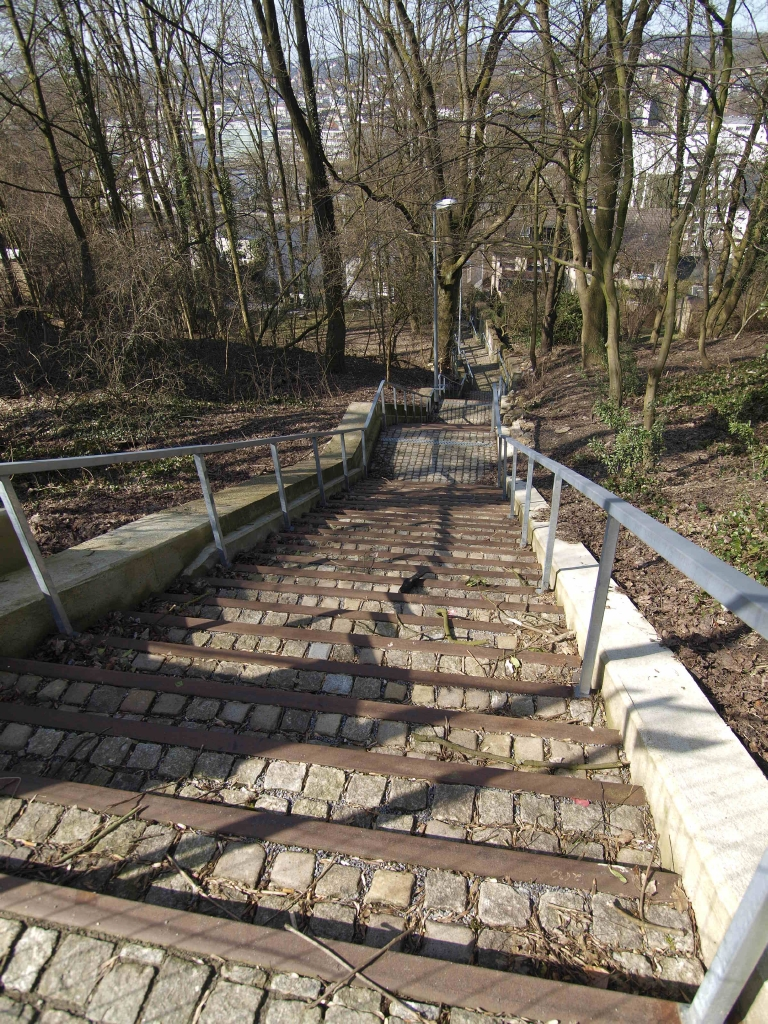 Wolkenburgtreppe Wuppertal Quartier Südstadt von der Wormser Straße zur Straße Wolkenburg. Erbaut ca. 1910. Ansicht von der Wormser Straße.